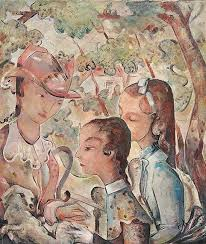 Joseph Kölschbach unbekannter Titel, unbekanntes Jahr: Eine Frau mit zwei Kindern